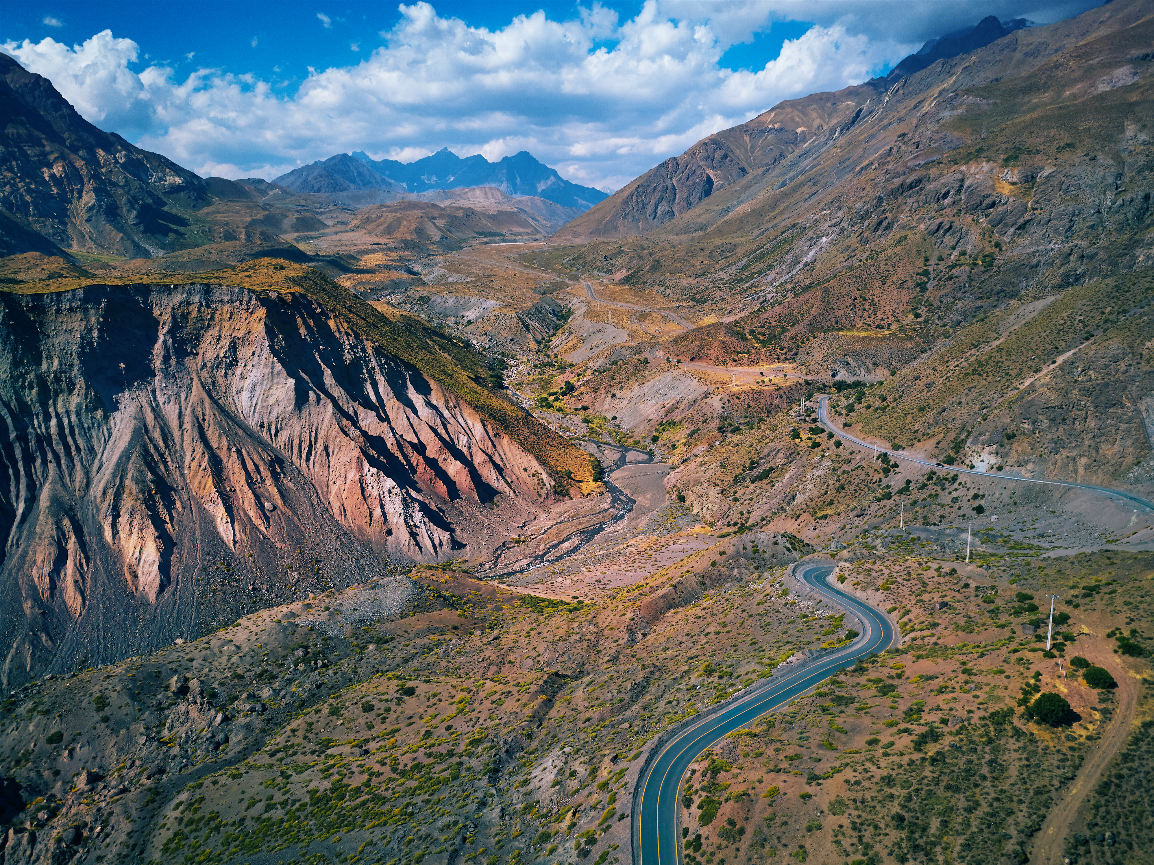 Cajón del Maipo